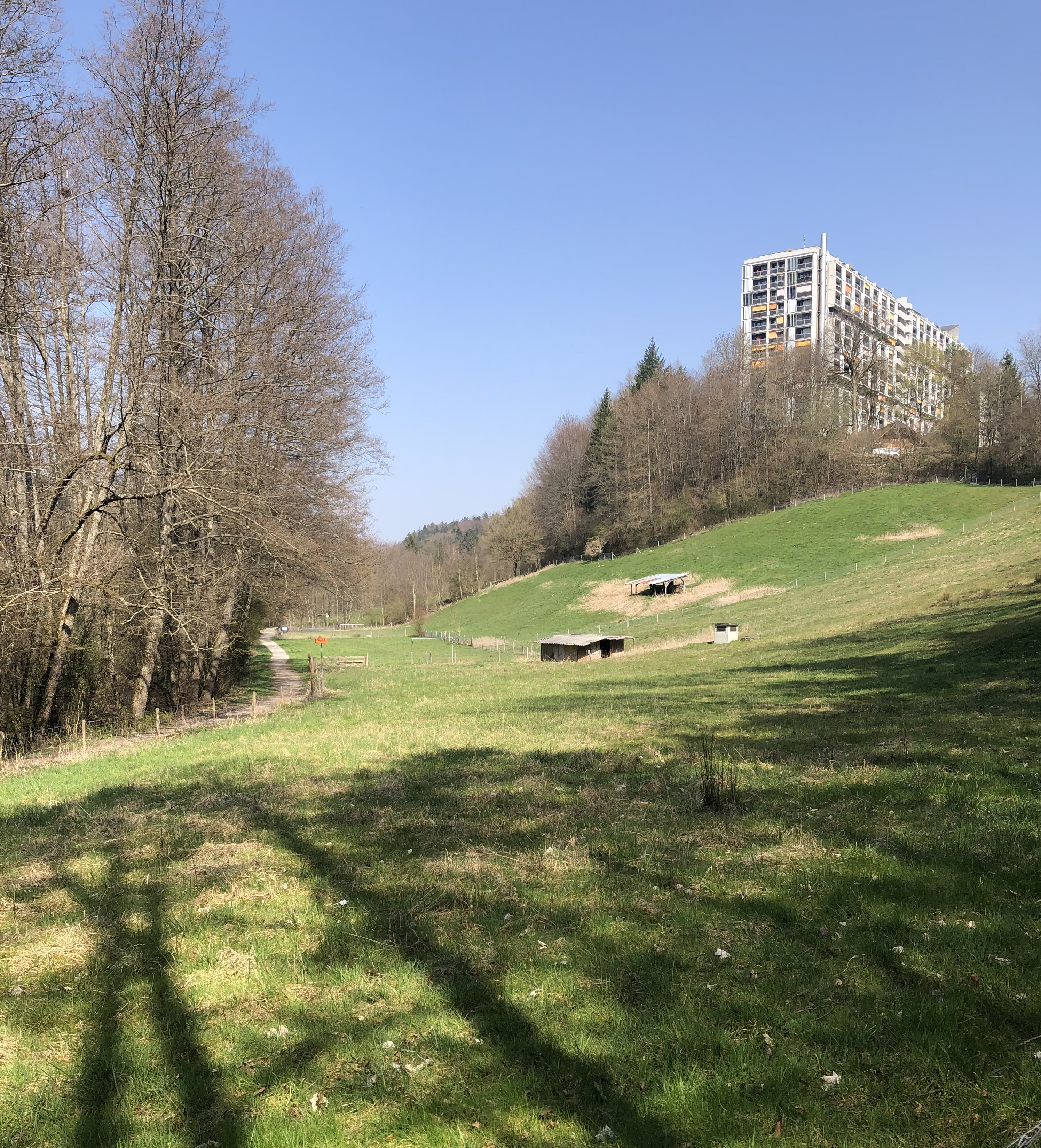 Gäbelbach Hochhausblick und Gäbelbachtal